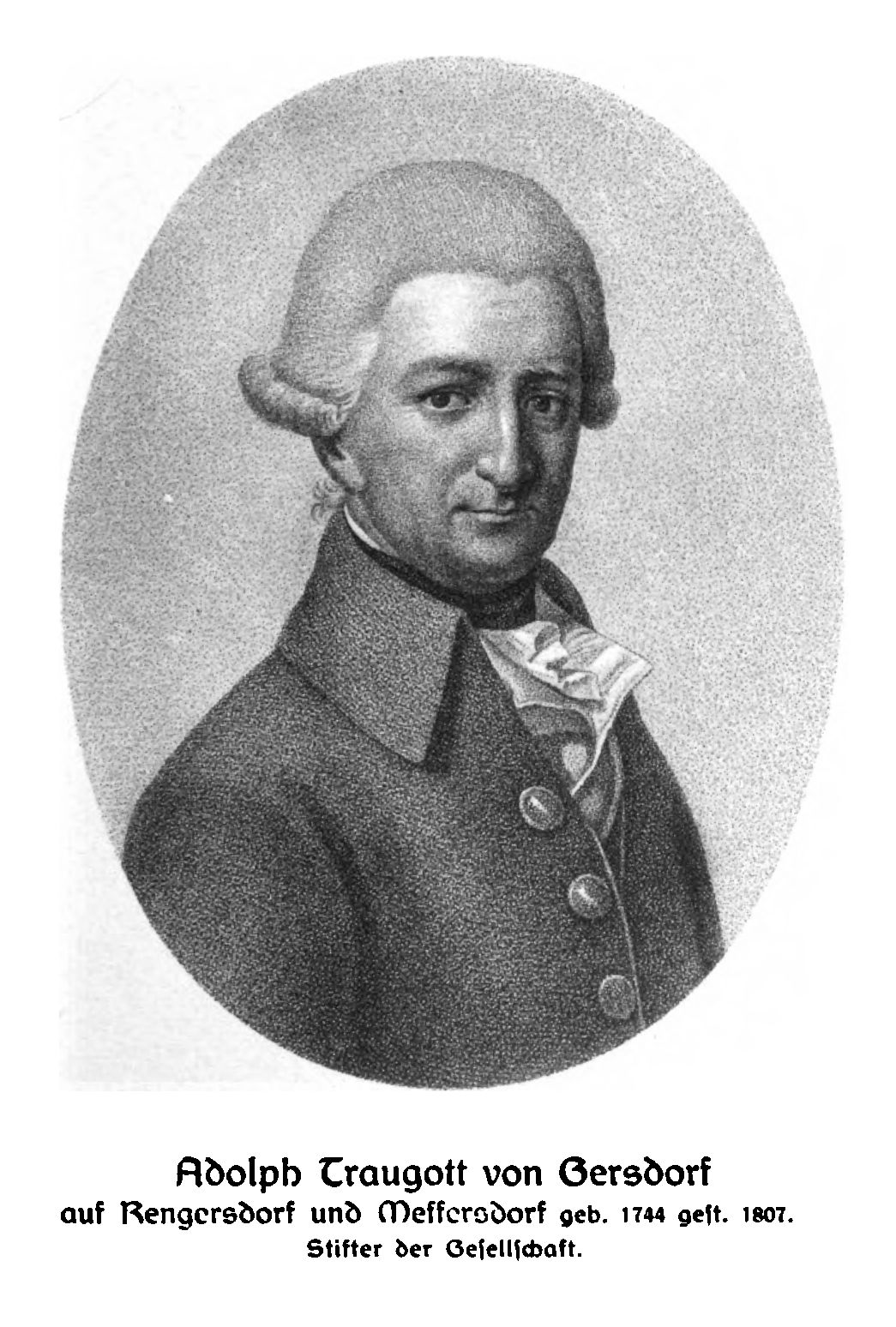 Adolf Traugott von Gersdorff (1777-1807), in: Neues lausitzisches Magazin, Band 80.